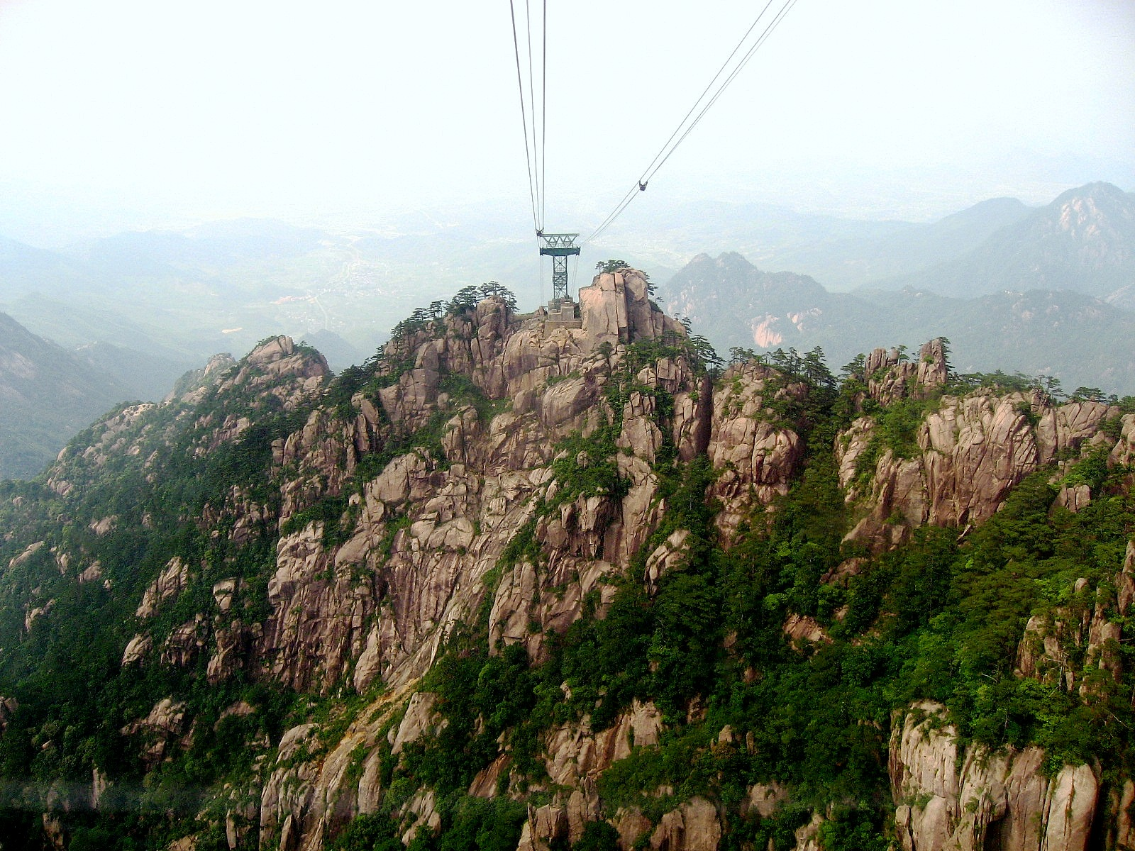 安徽 黄山 - 云谷缆车内前望